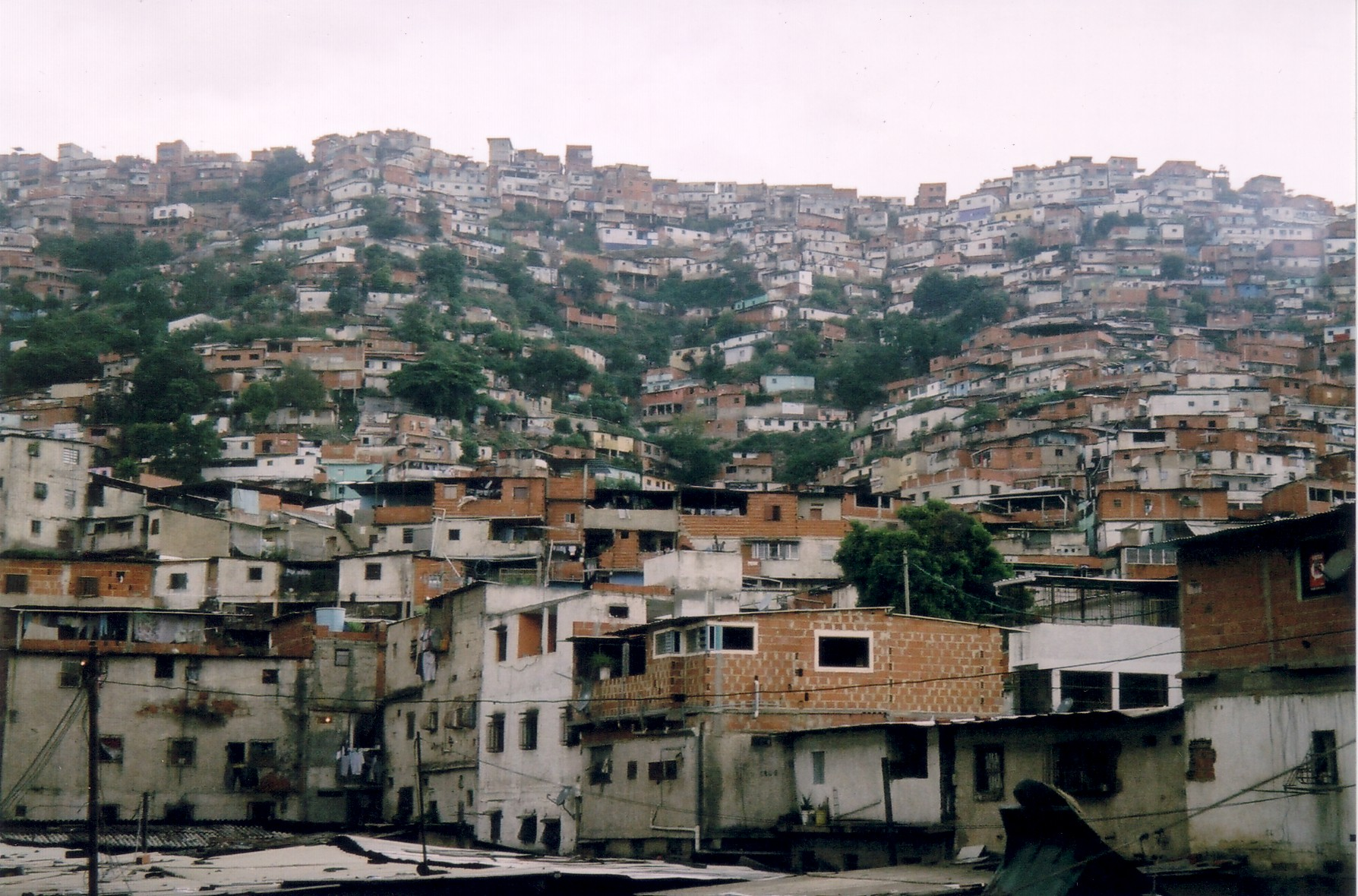 "Cerro" in Caracas, Venezuela.